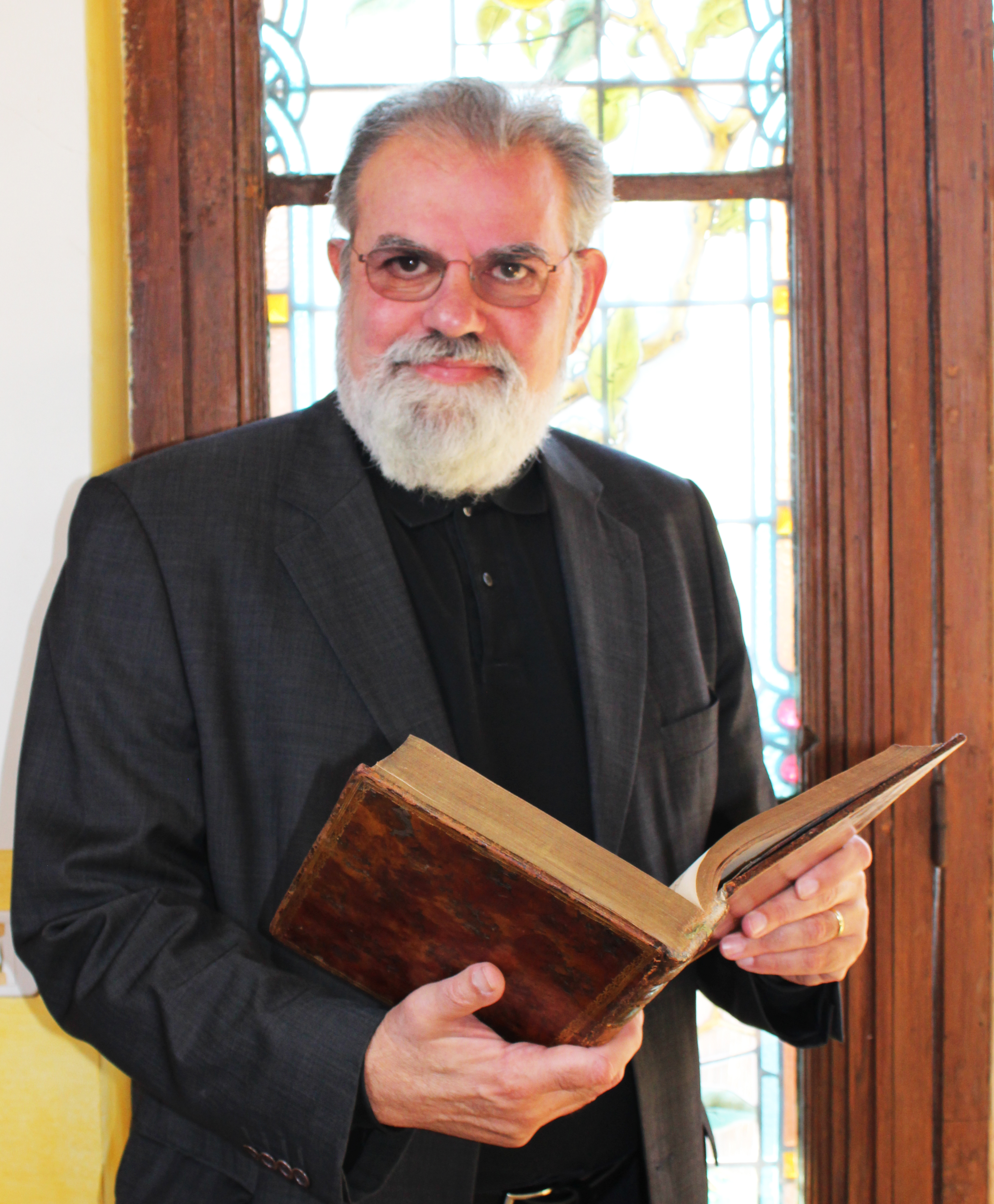 Pierre Mollier en 2019